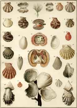 Testacea Utriusque Siciliae eorumque historia et anatome tabulis (plate)